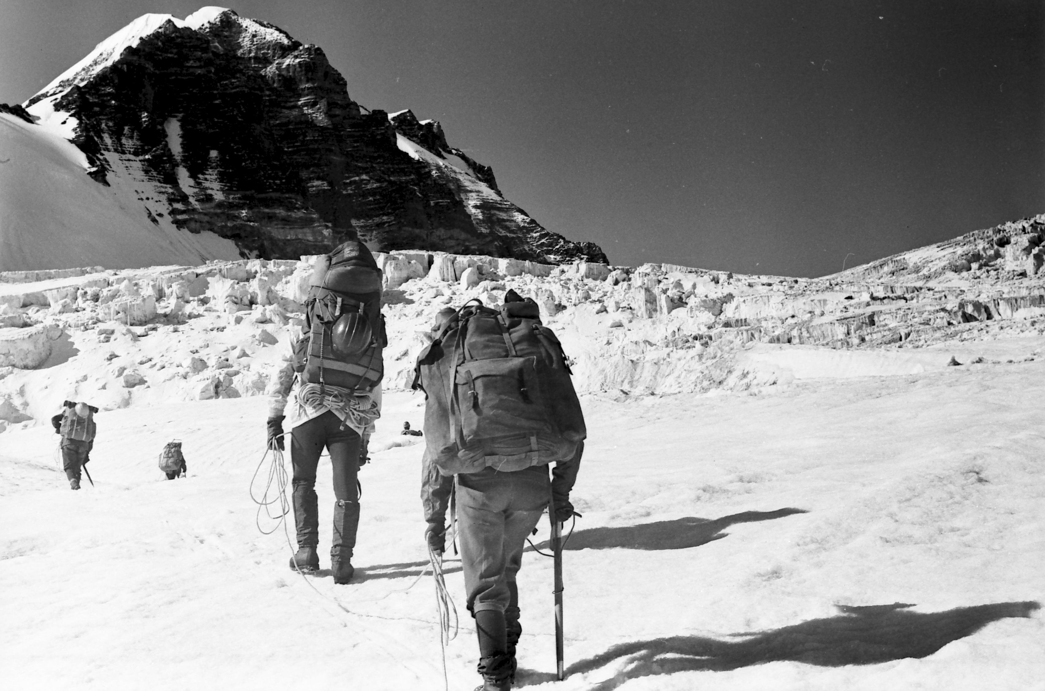 Ekspeditsioon mäetipule "Tartu Ülikool 350".